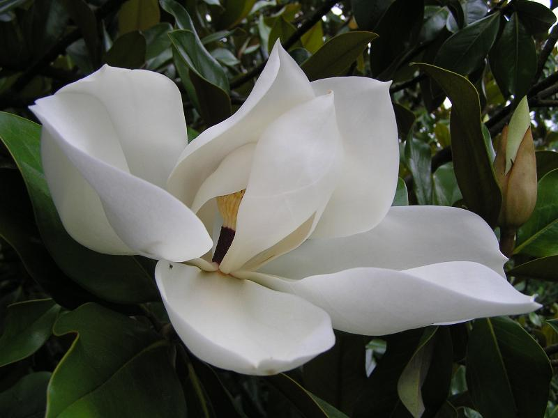 Magnolia grandiflora